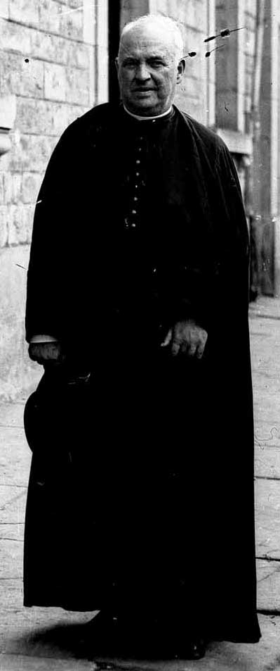 Resurreccion Maria Azkue hizkuntzalari lekeitiarra.